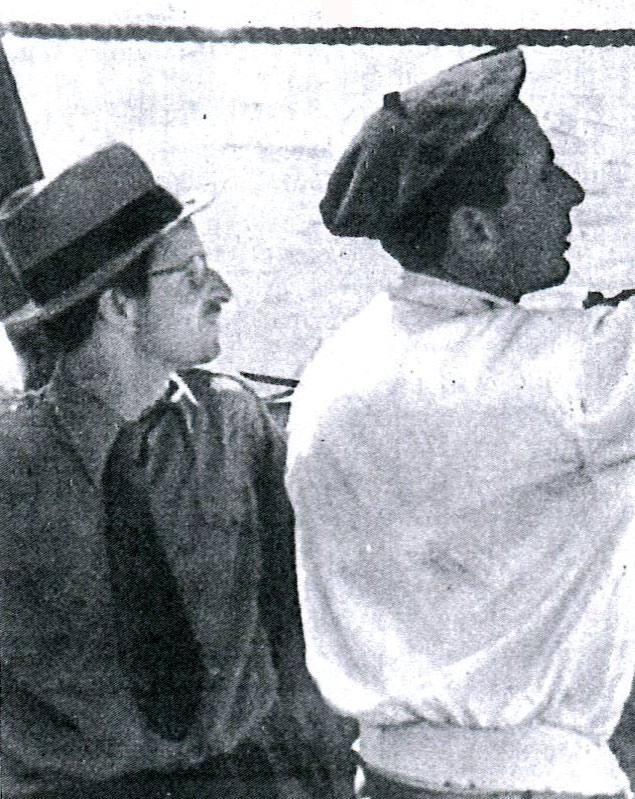 Aldo Tonti (a sinistra) con il regista Flavio Calzavara all'Isola del Giglio durante le riprese di Piccoli Naufraghi, regia di Calzavara, produzione Alfa Film, Roma, 1939